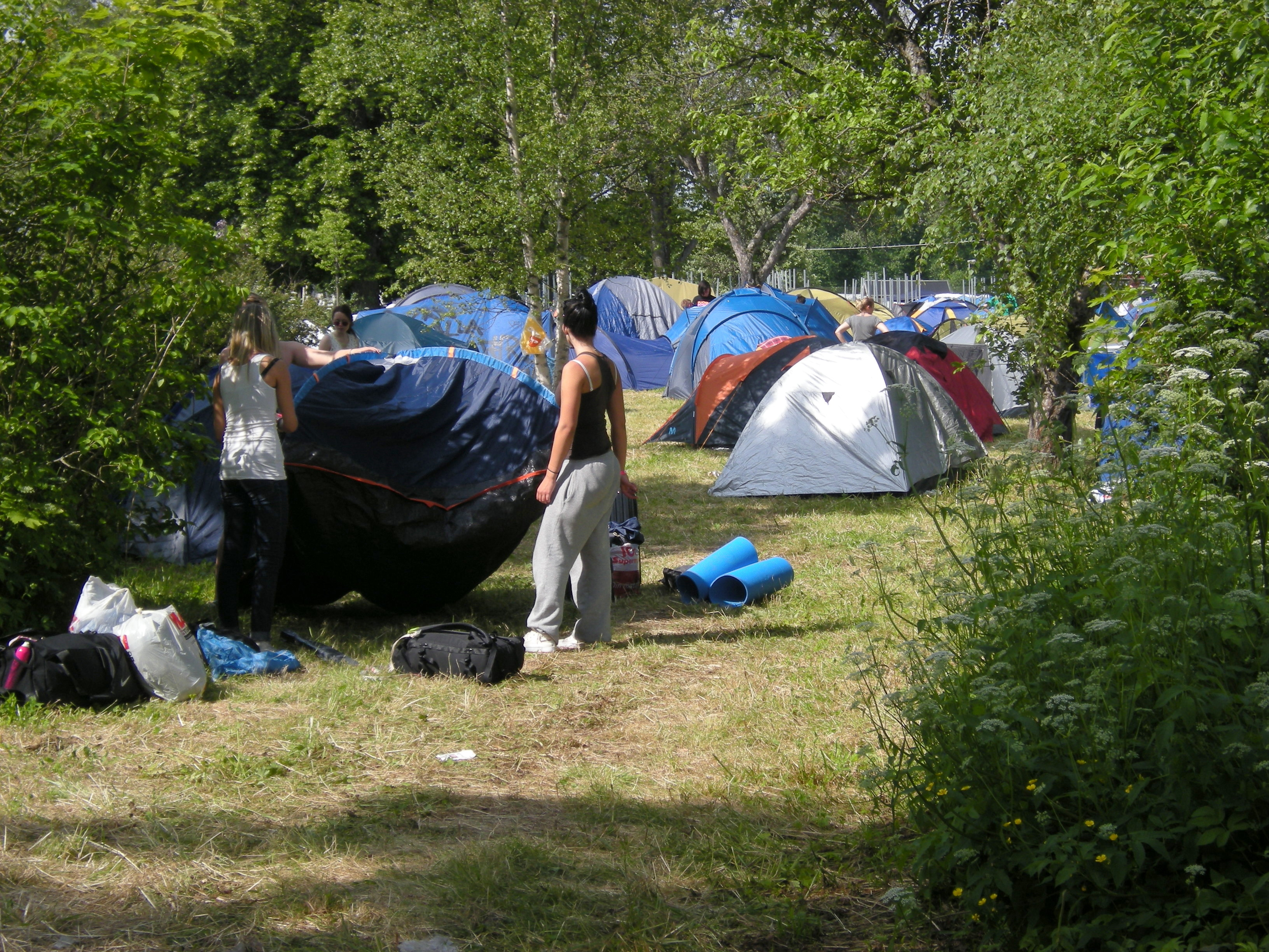 Från Peace and Love, campingen, tält